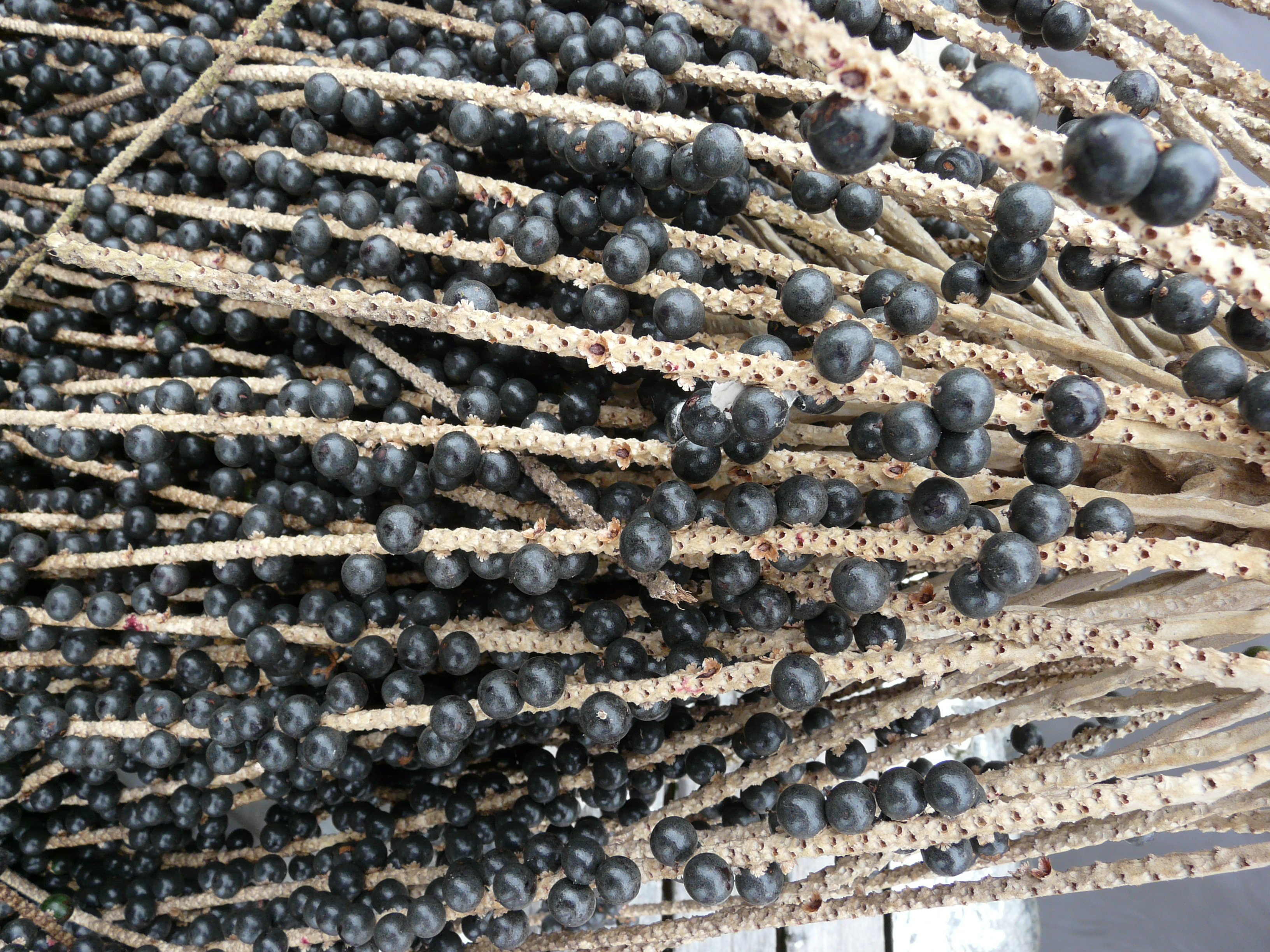 Salat-euterpepalmi (Euterpe oleracea) marjad (assai). Pildistatud aprilli lõpus Rio Negrol Amasoonias.